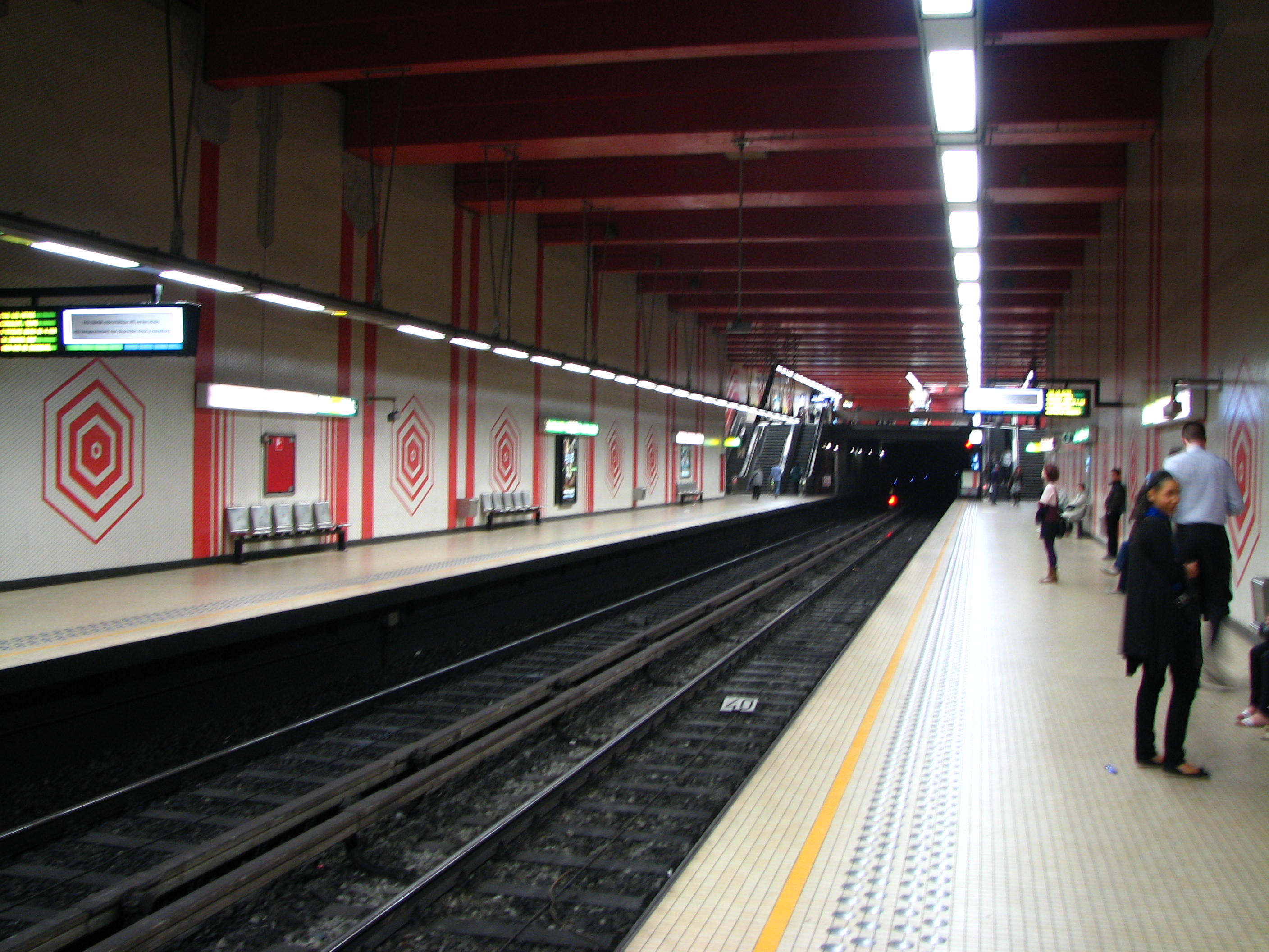 metrostation IJzer